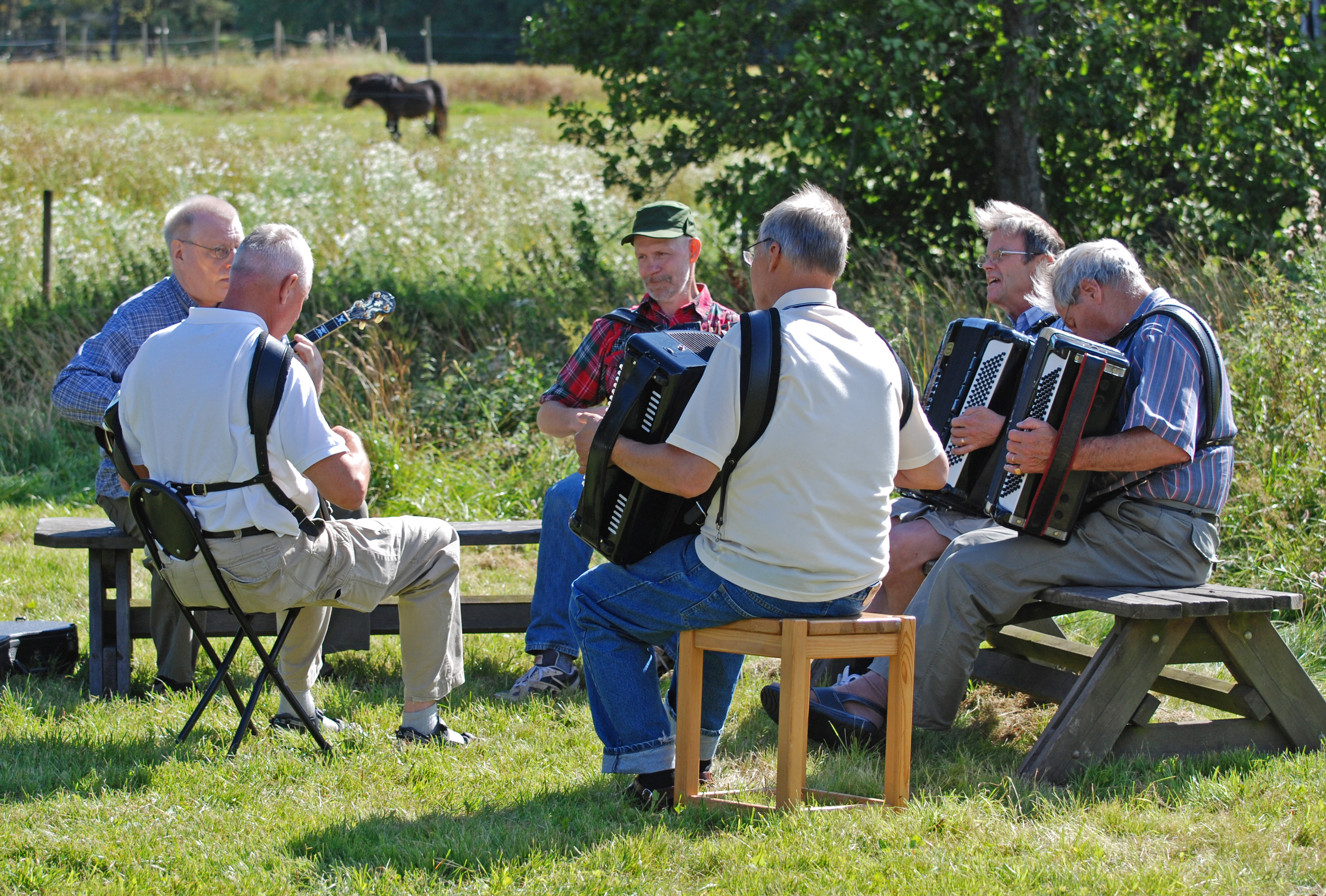 Buskspel vid spelmansstämma i Tyresta by 25 augusti 2007